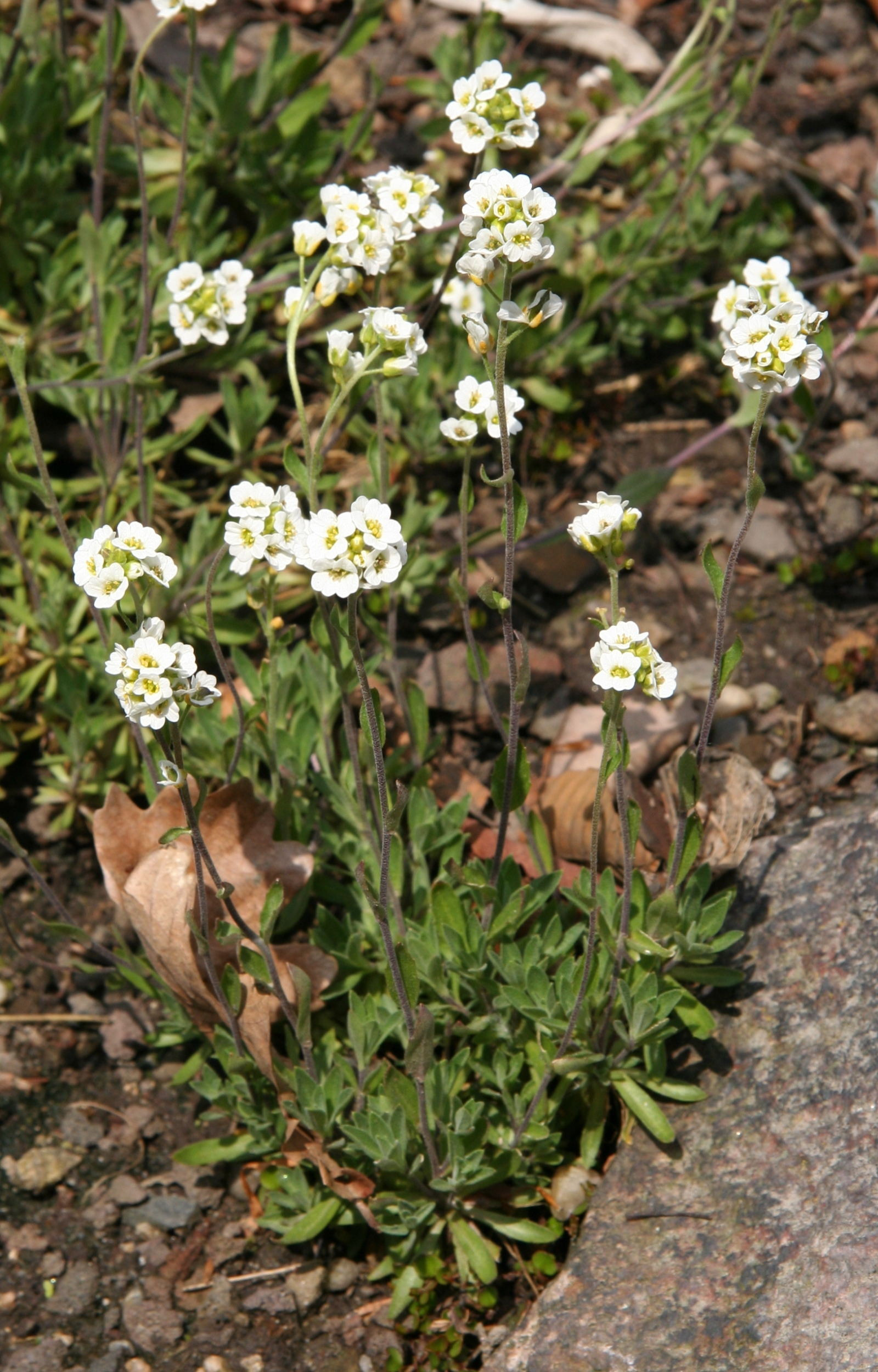 Draba magellanica im Botanischen Garten Dresden